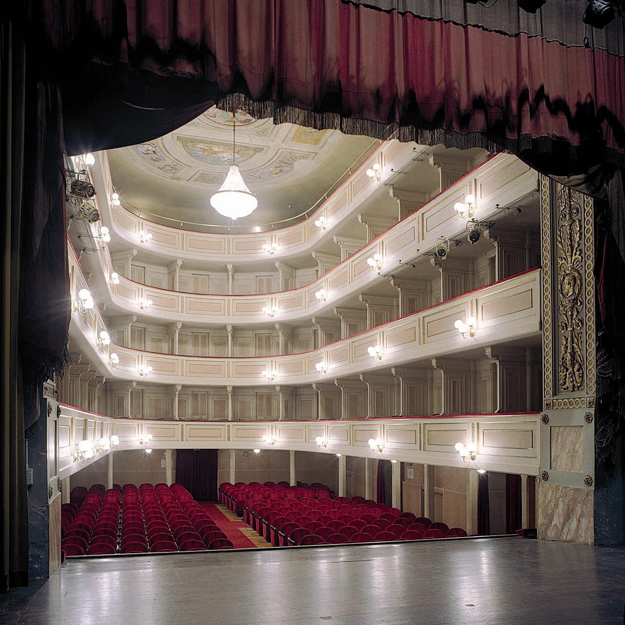 Teatro Comunale di Guastalla